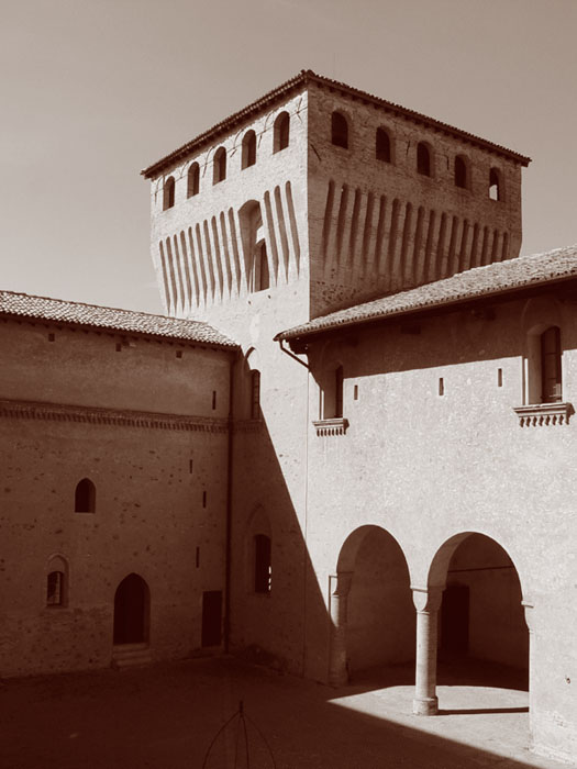 Parma, Emila Romagna, Italia